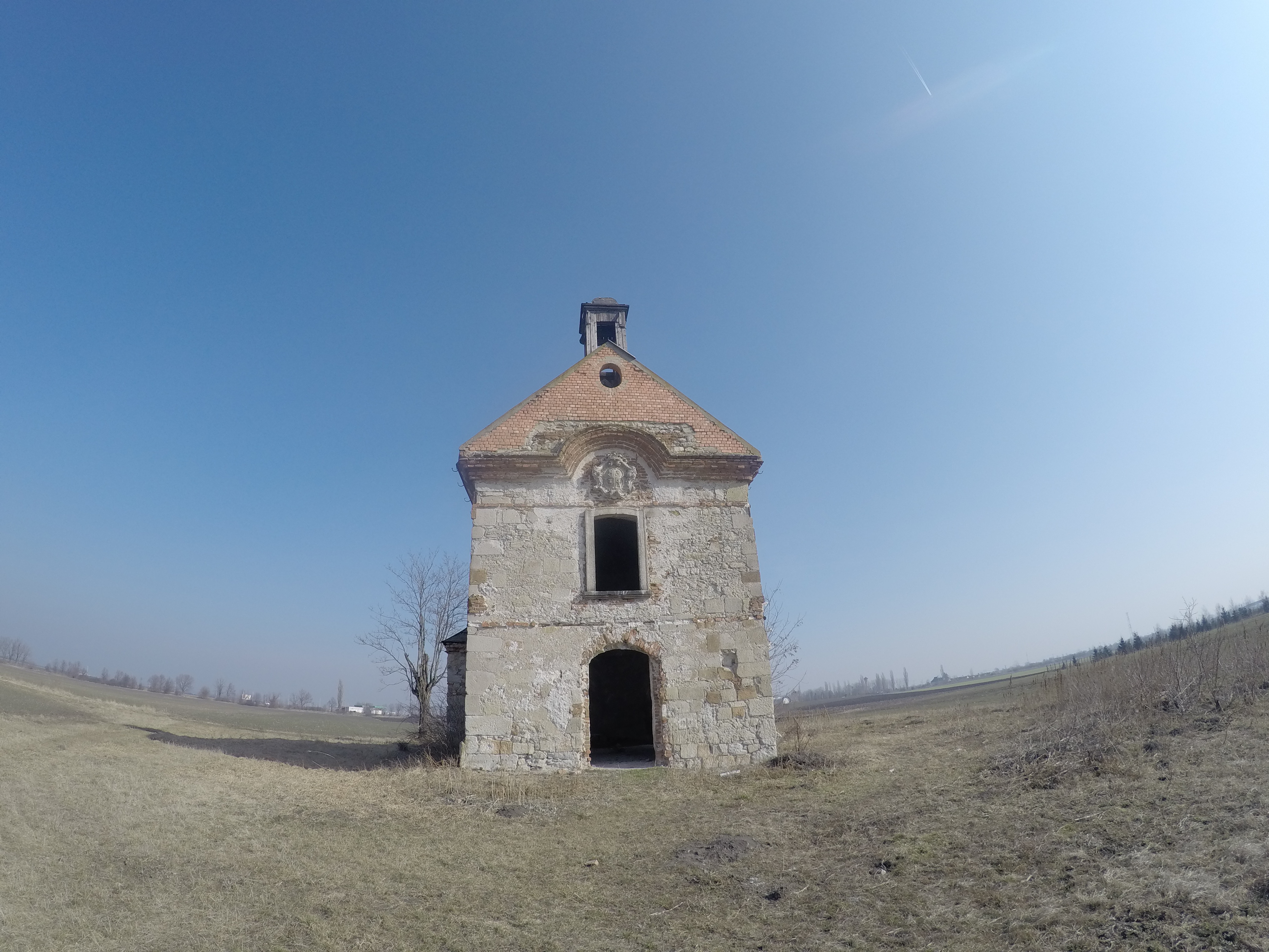 Füzesabony, Pusztaszikszó kápolna főbejárata 2015-ben.